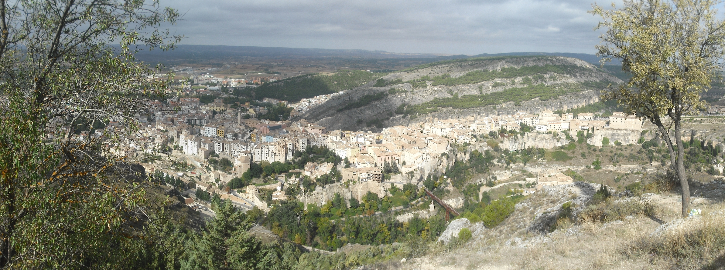 Vista de la ciudad antigua desde el Cristo del Socorro.